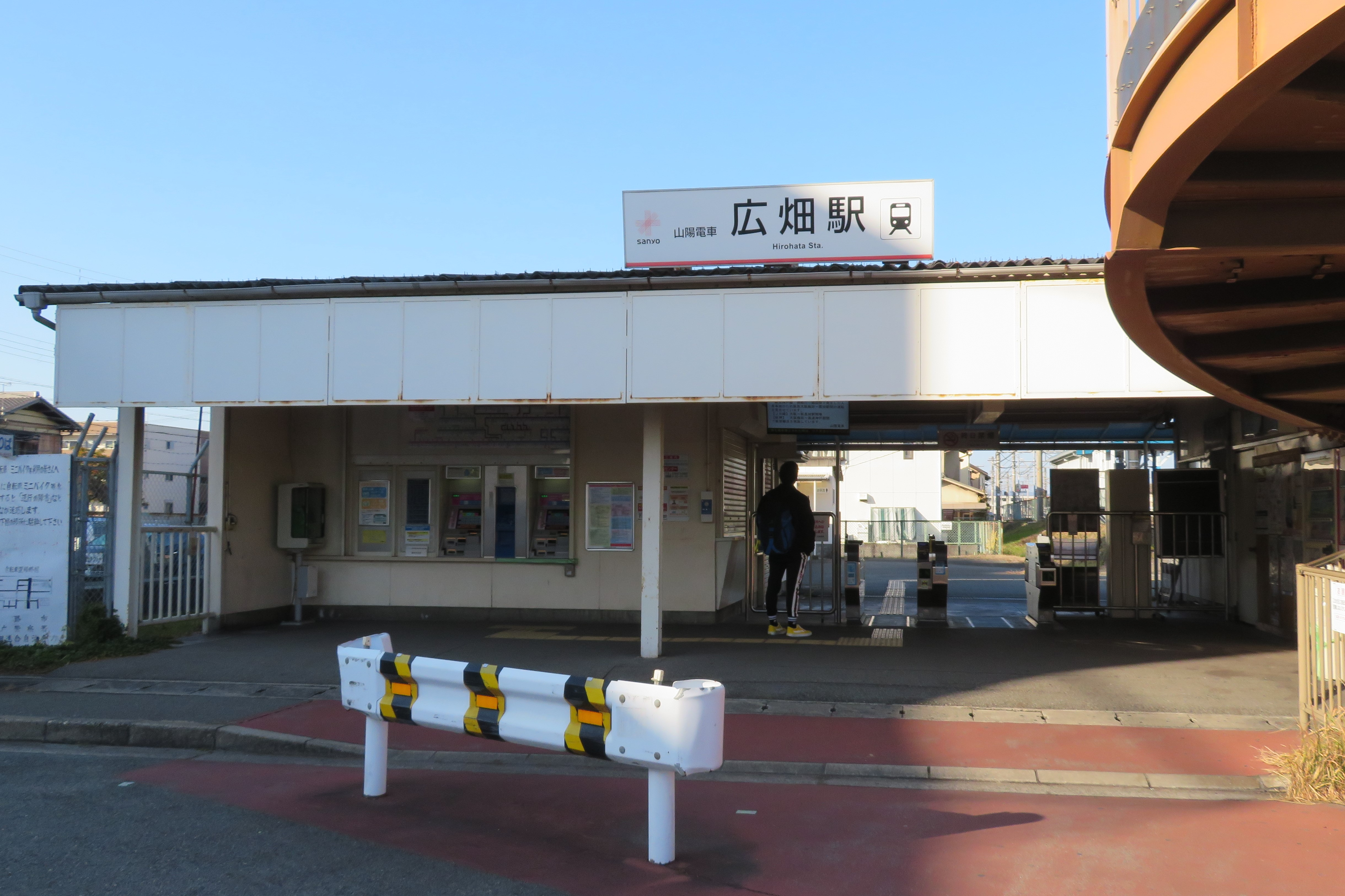 山陽電鉄広畑駅